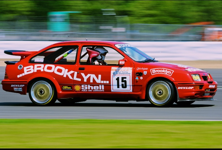 Craig Davies en Silverstone Classic